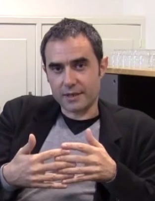 De Spaanse architect Alejandro Zaera-Polo